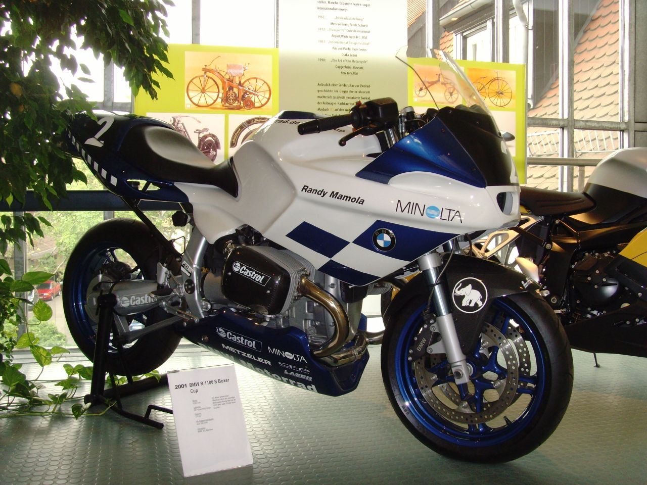 1085 ccm, 98 PS, über 200 km/h. Mit dieser seriennahen Maschine nahm der viermalige Weltmeister Randy Mamola als VIP-Fahrer beim 2004er Boxer Cup teil. Deutsches Zweirad- und NSU-Museum Neckarsulm.